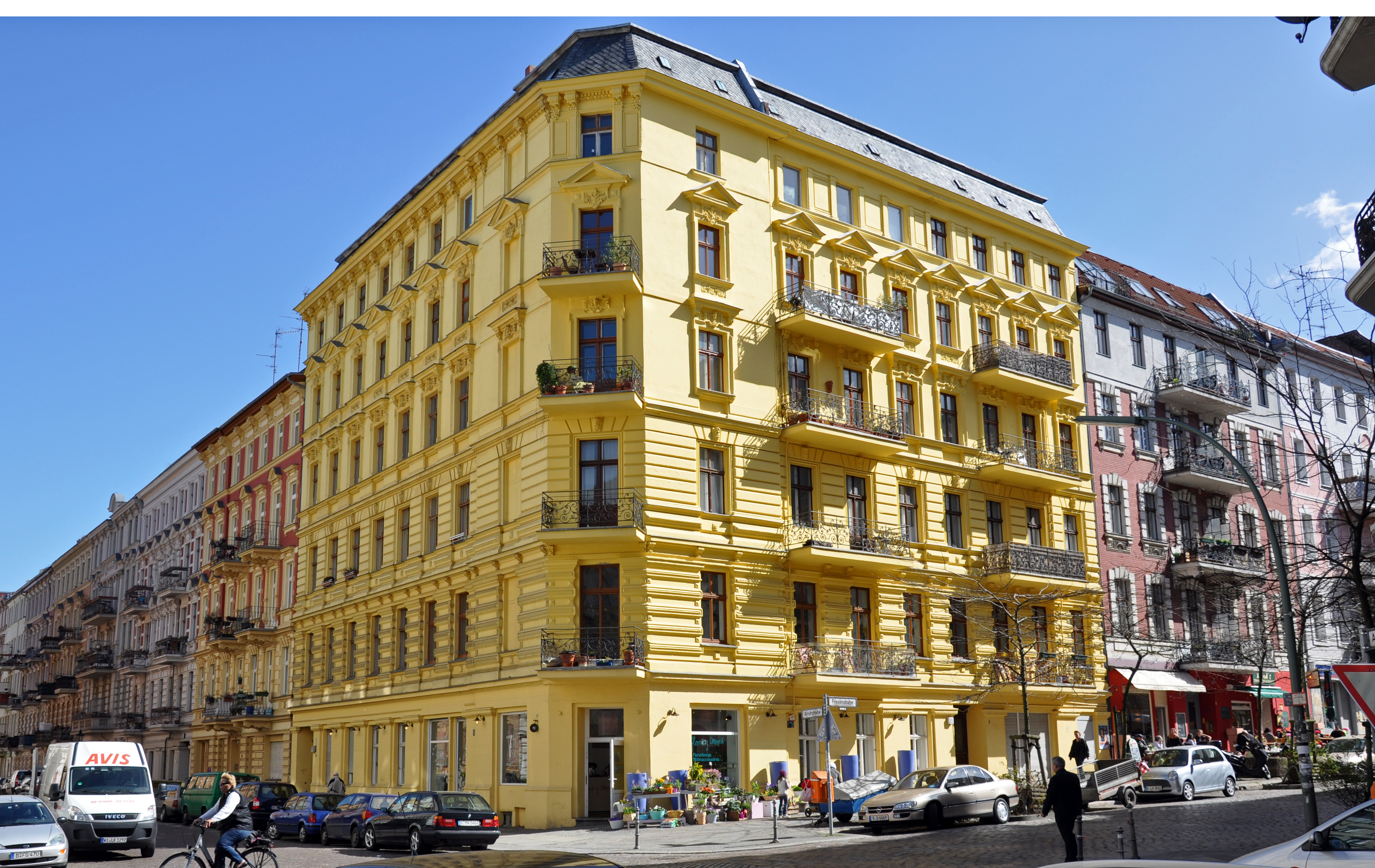 schöne fassade friesenstr./ecke arndtstr. Berlin-Kreuzberg